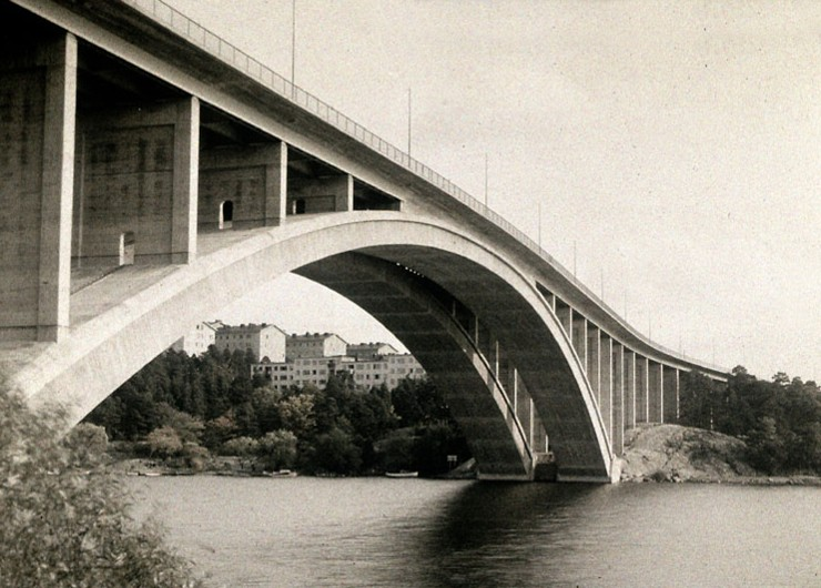 Tranebergsbron i Stockholm omkring 1937. Vy mot Kristineberg